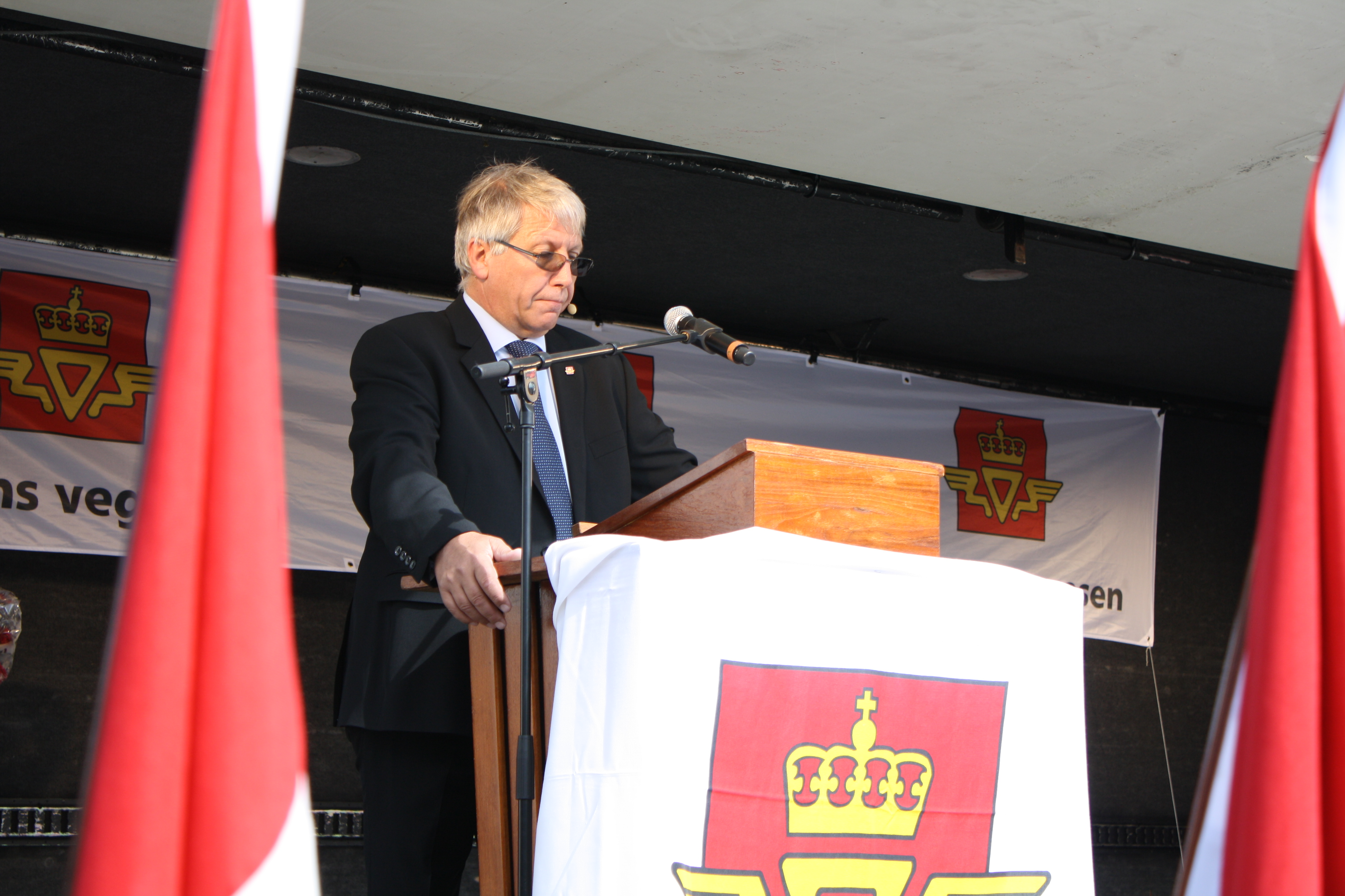 Vegdirektør Terje Moe Gustavsen holder tale i forbindelse med åpningen av Nordre avlastningsveg.